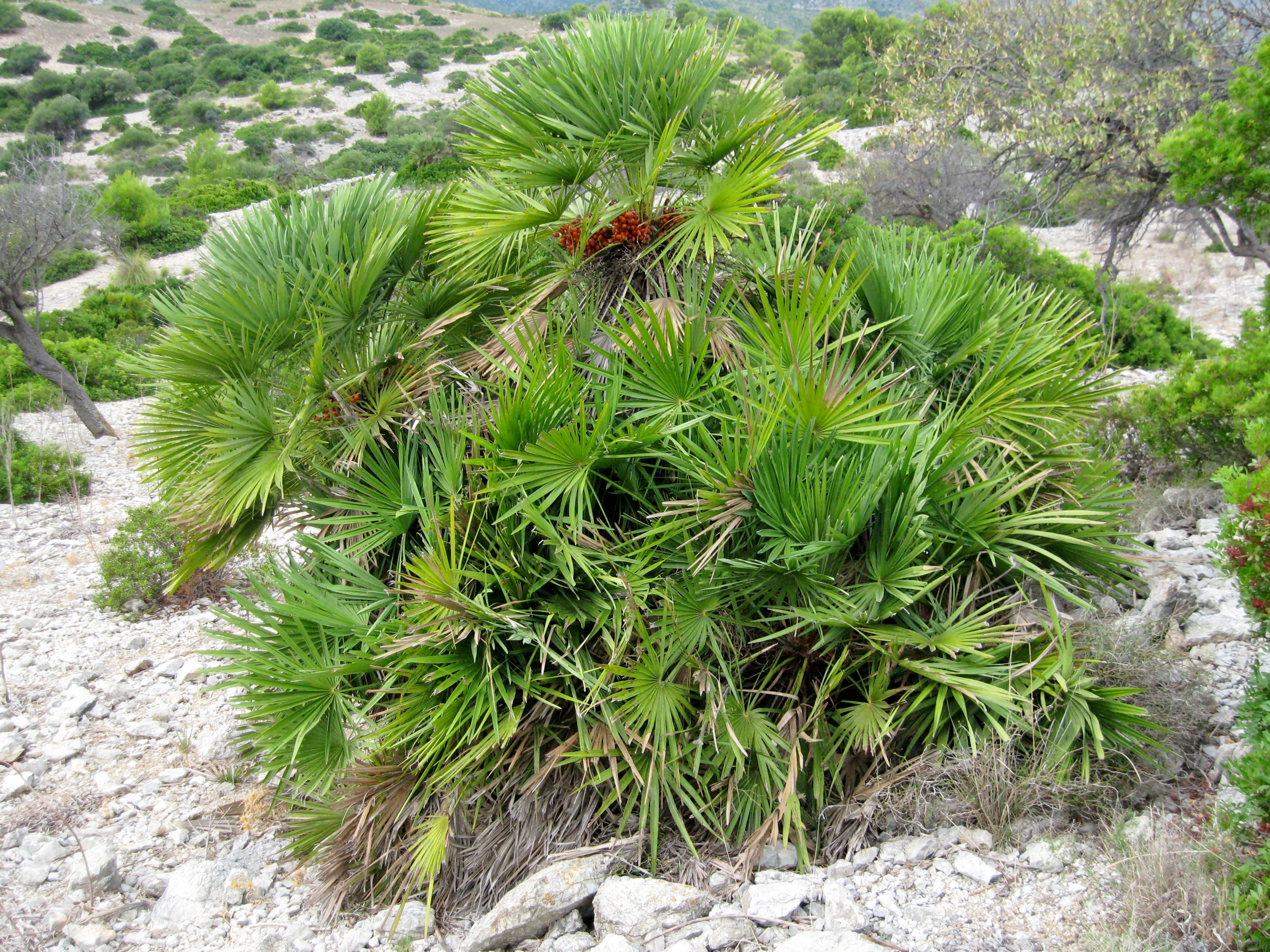 Zwergpalme (Chamaerops humilis) im Gebiet es Saulonar nahe dem Kap Morro d’Aubarca an der Nordostküste von Mallorca, Spanien